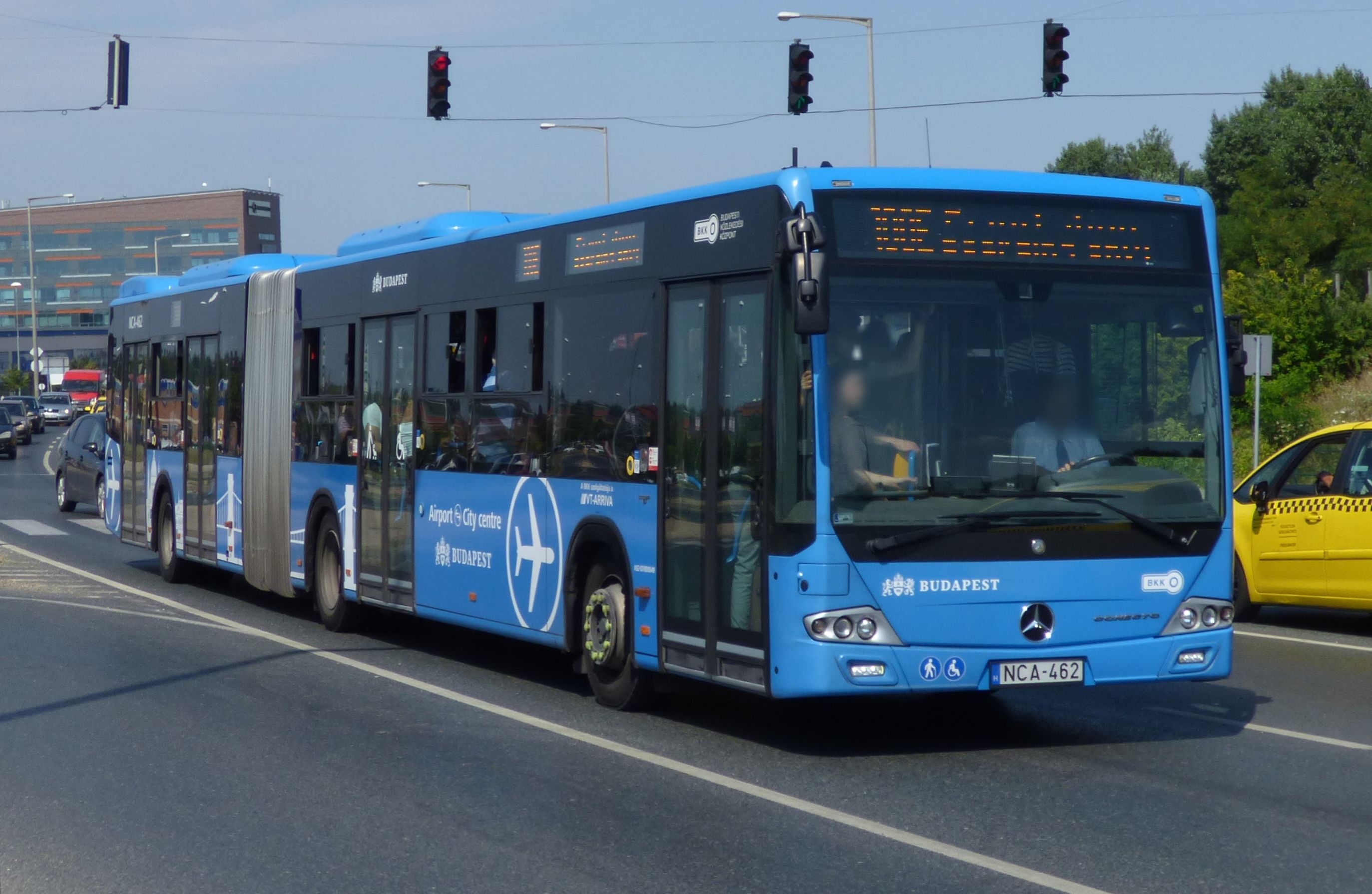 100E jelzésű Mercedes-Benz Conecto G busz a 4-es főúton Vecsésnél (frsz. NCA-462)